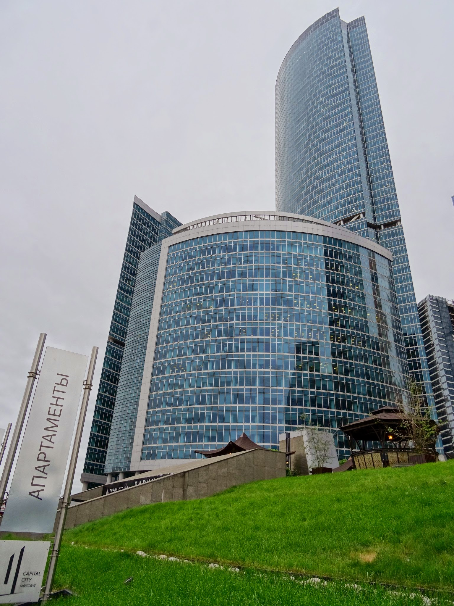 Москва